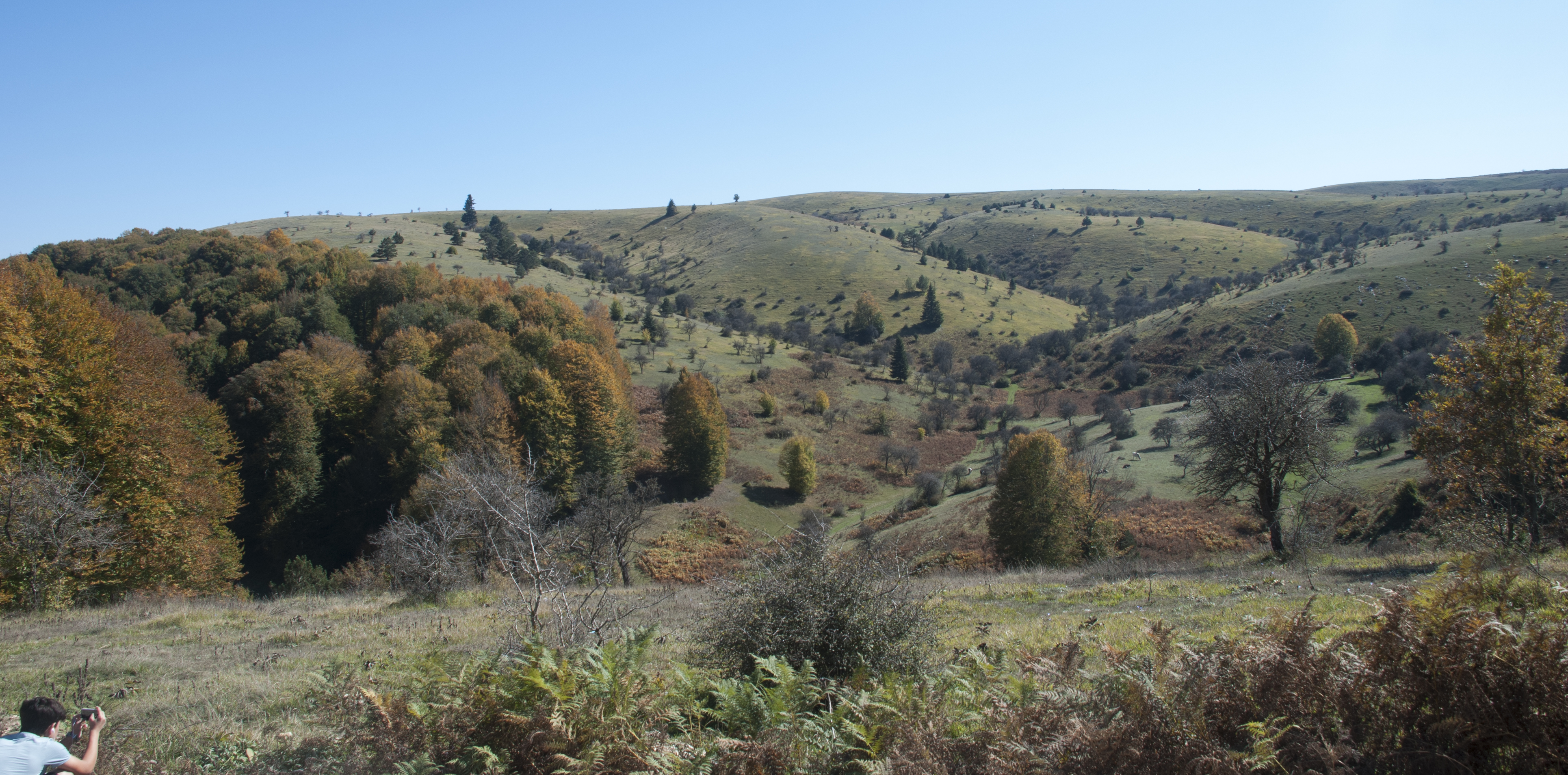 Sakarya, Akyazı, Davlumbaz Yaylası